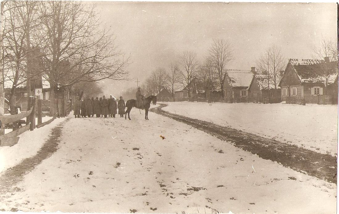 Wojska niemieckie w Olszewce pod Przasnyszem marzec 1915 rok